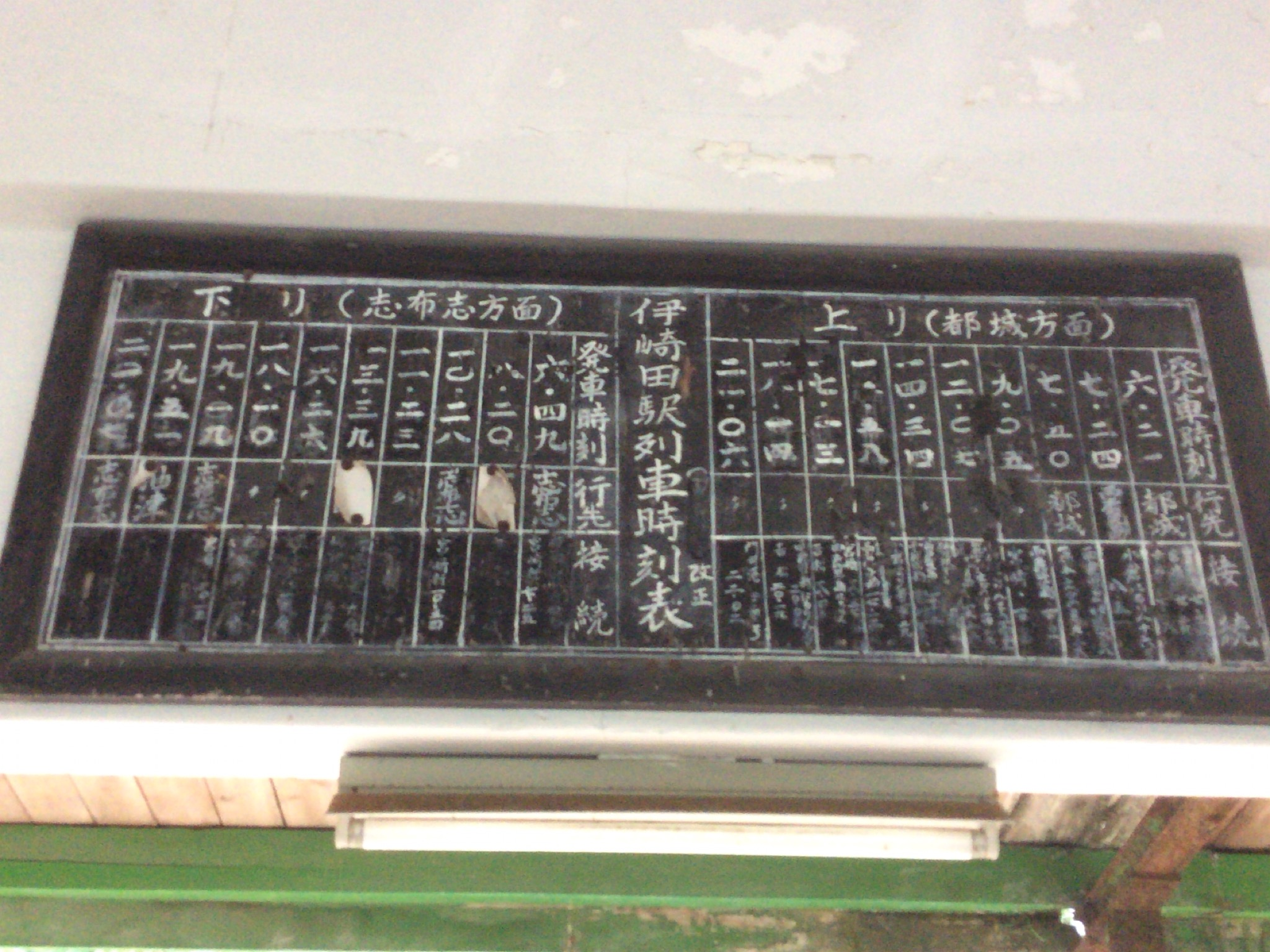 かつての志布志線の伊崎田駅時刻表が旧改札口上に掲示されている。 2015-09-08 撮影